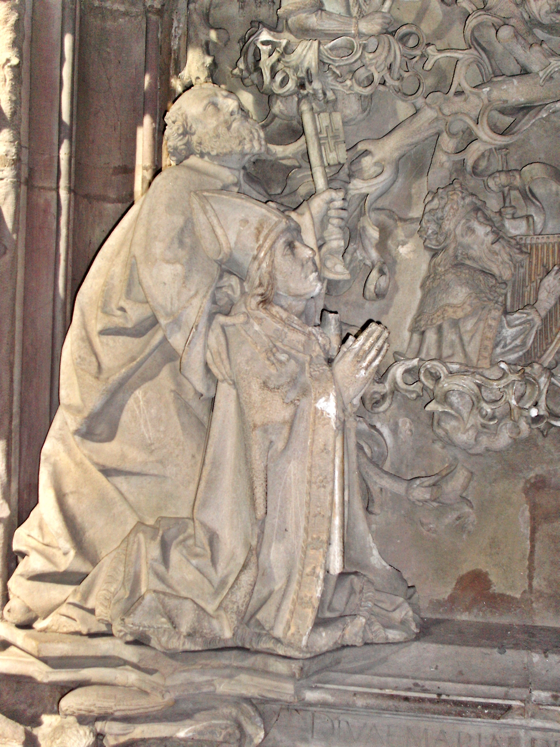 Bischof Johann von Dalberg Worms, Skulptur im Wormser Dom (Wurzel Jesse) aus dem ehem. Kreuzgang.